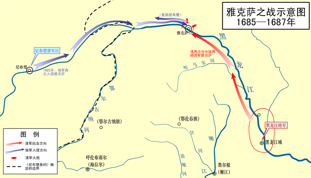 雅克萨之战意示图 绘制人:竹围墙